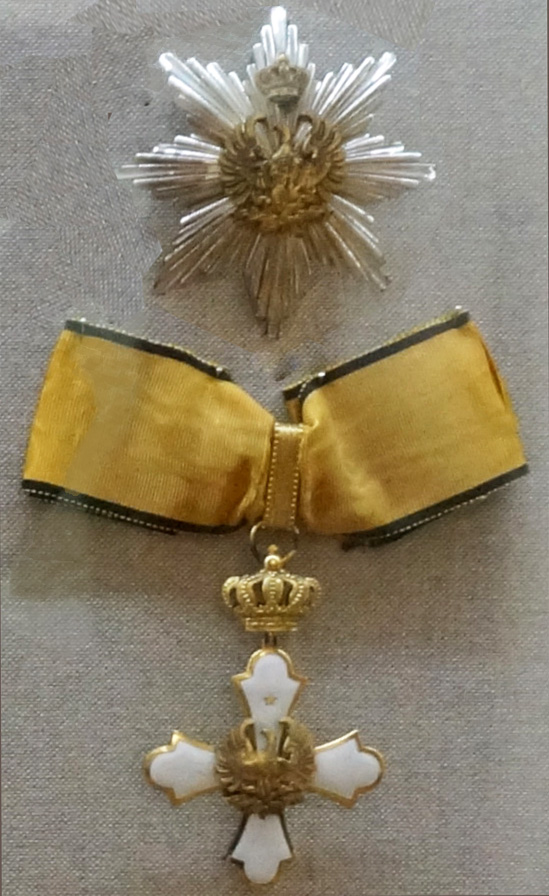 Présentées au musée.